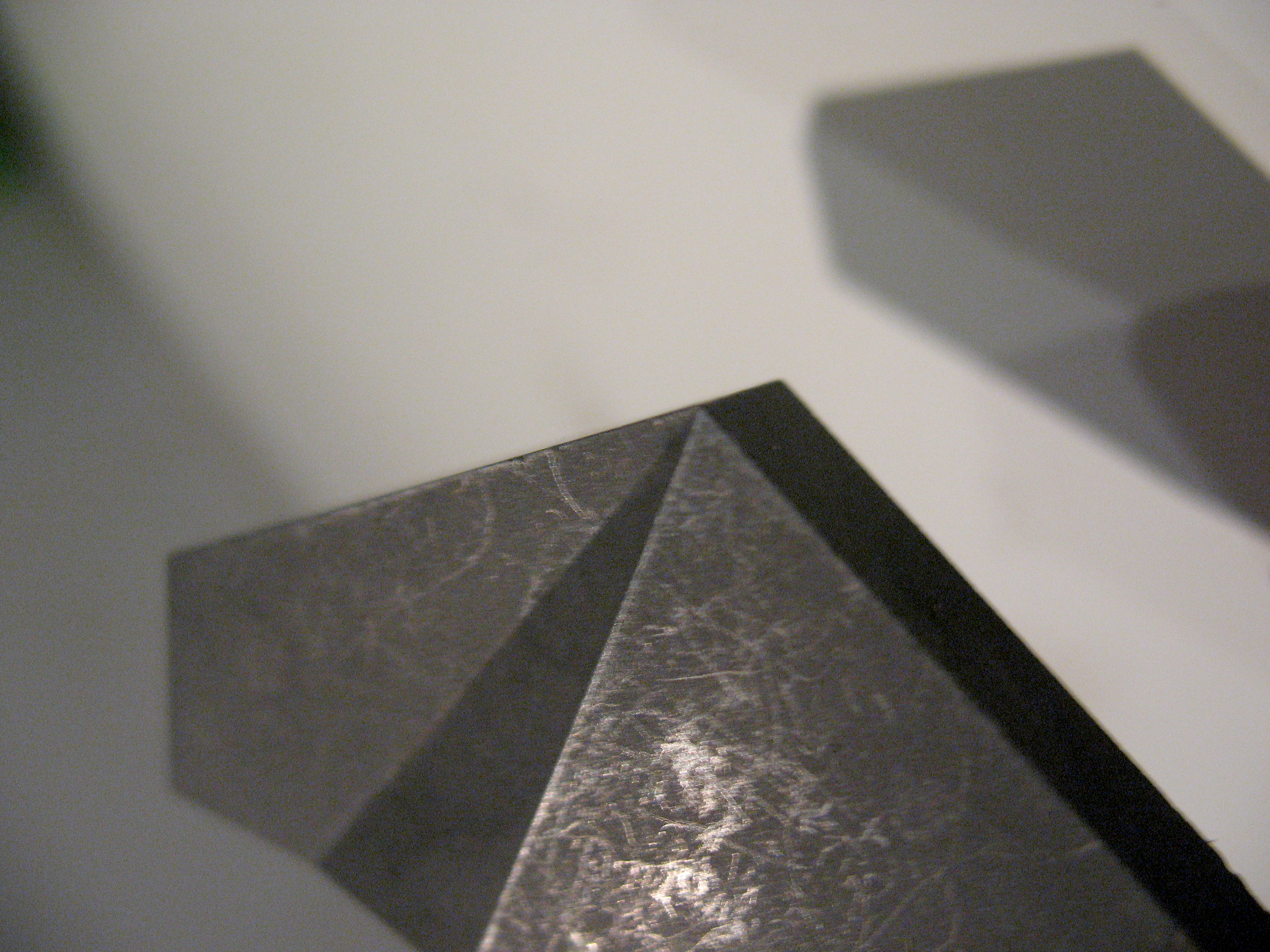 + 00000000001_Image_Schneidwerkzeug